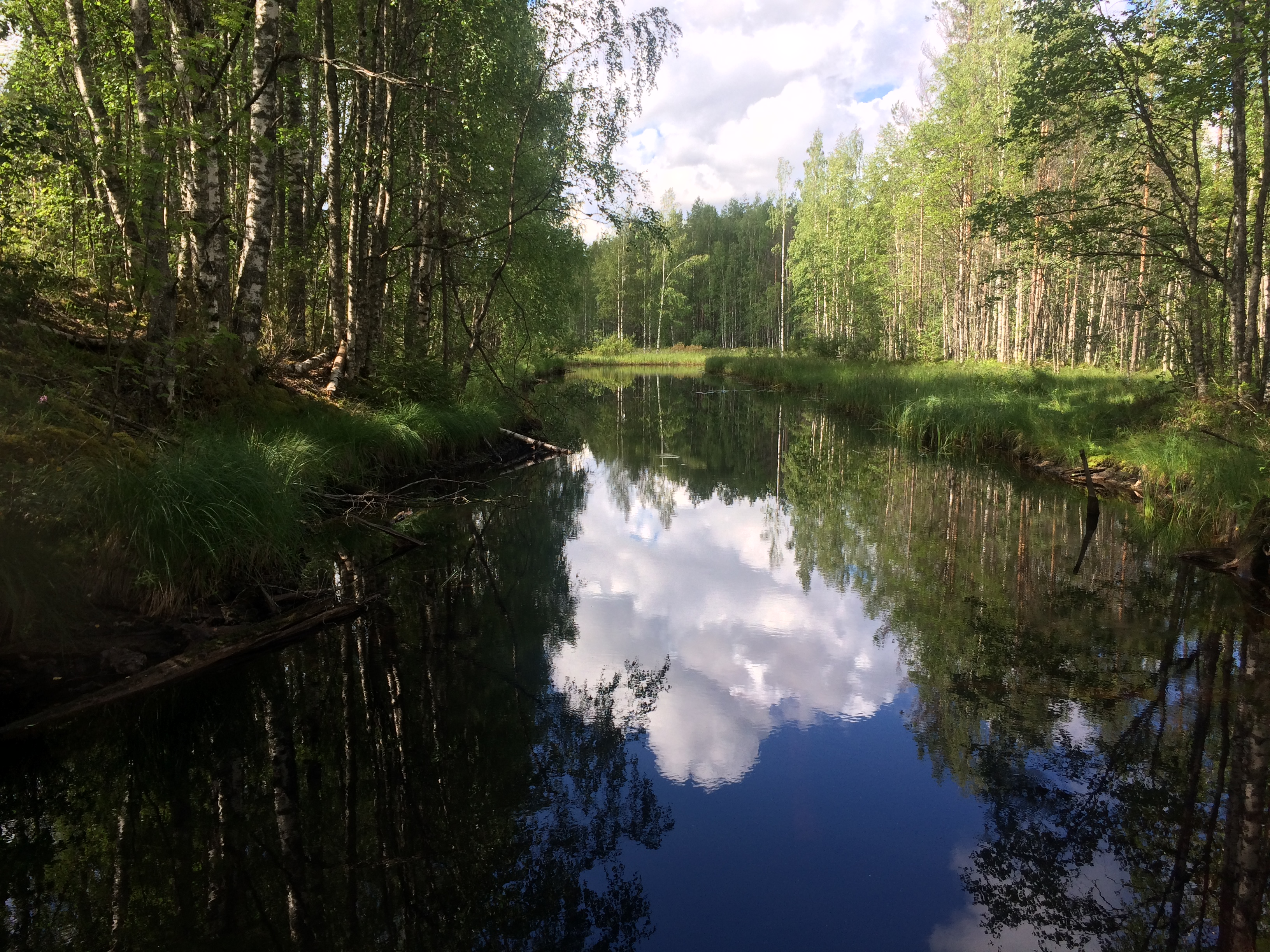 река Кивач